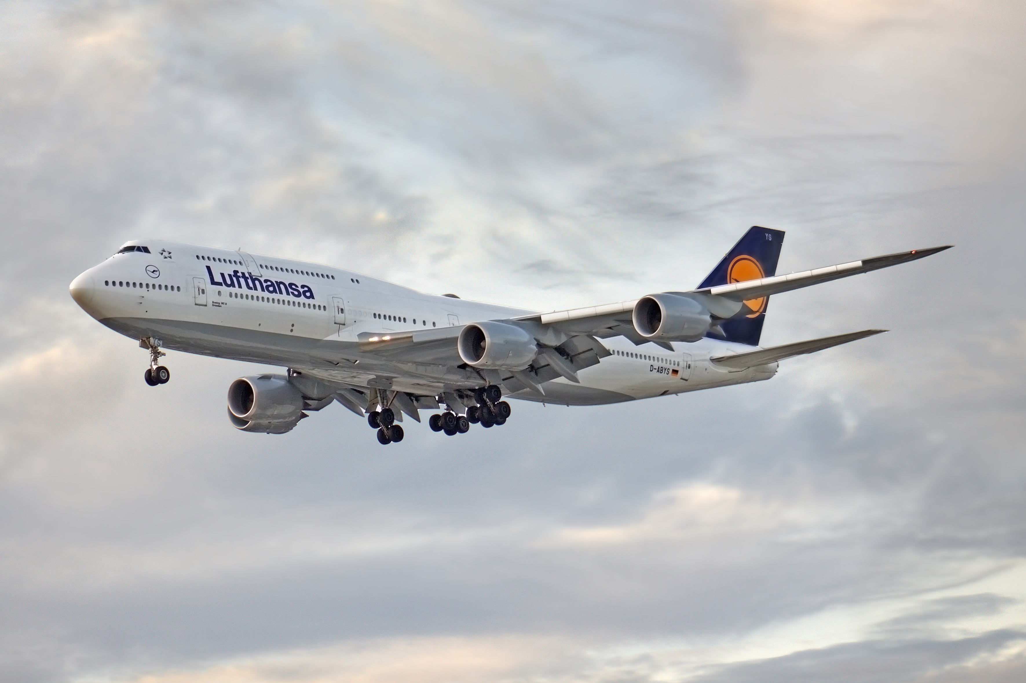 SBGR 25/01/2017